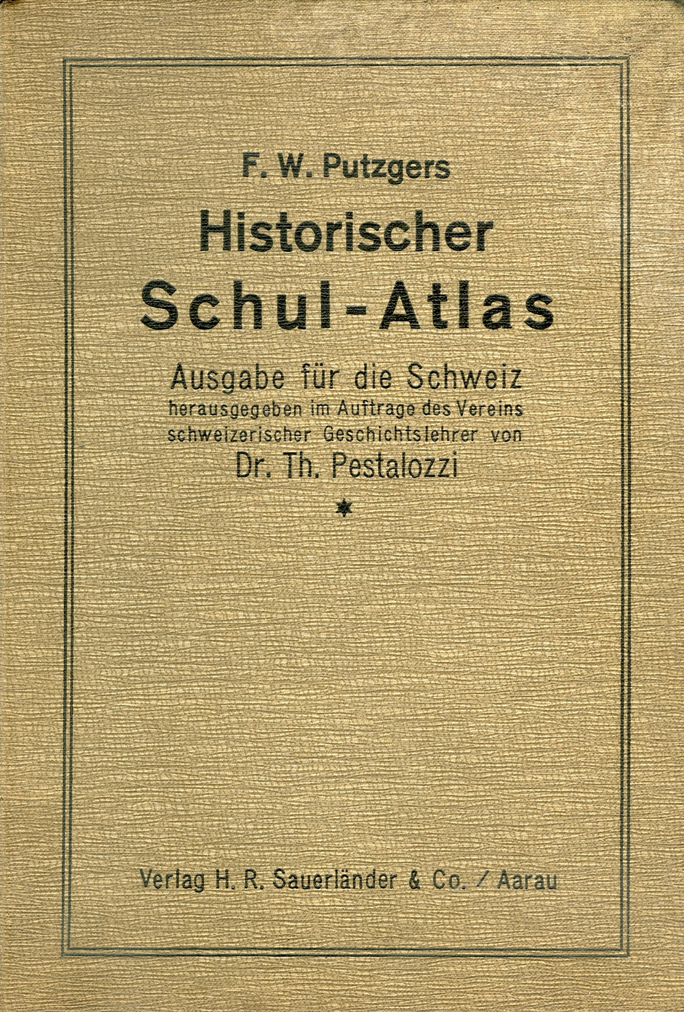 Schweizer Ausgabe von Putzgers Schulatlas von 1924